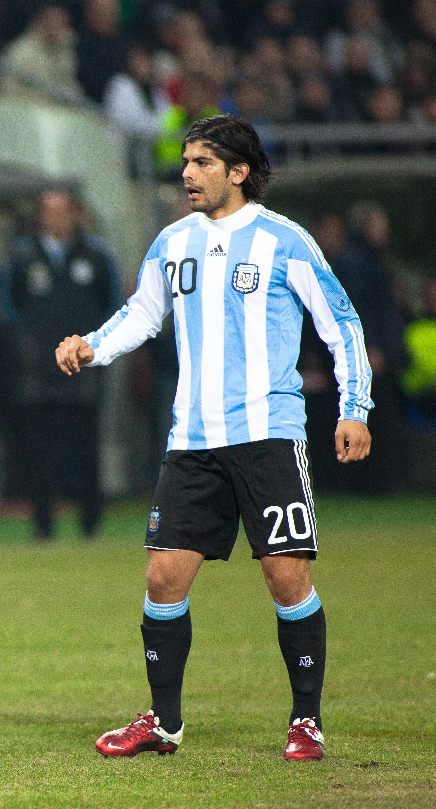 Éver Banega lors du match amical Argentine-Portugal le 9 février 2011 à Genève.